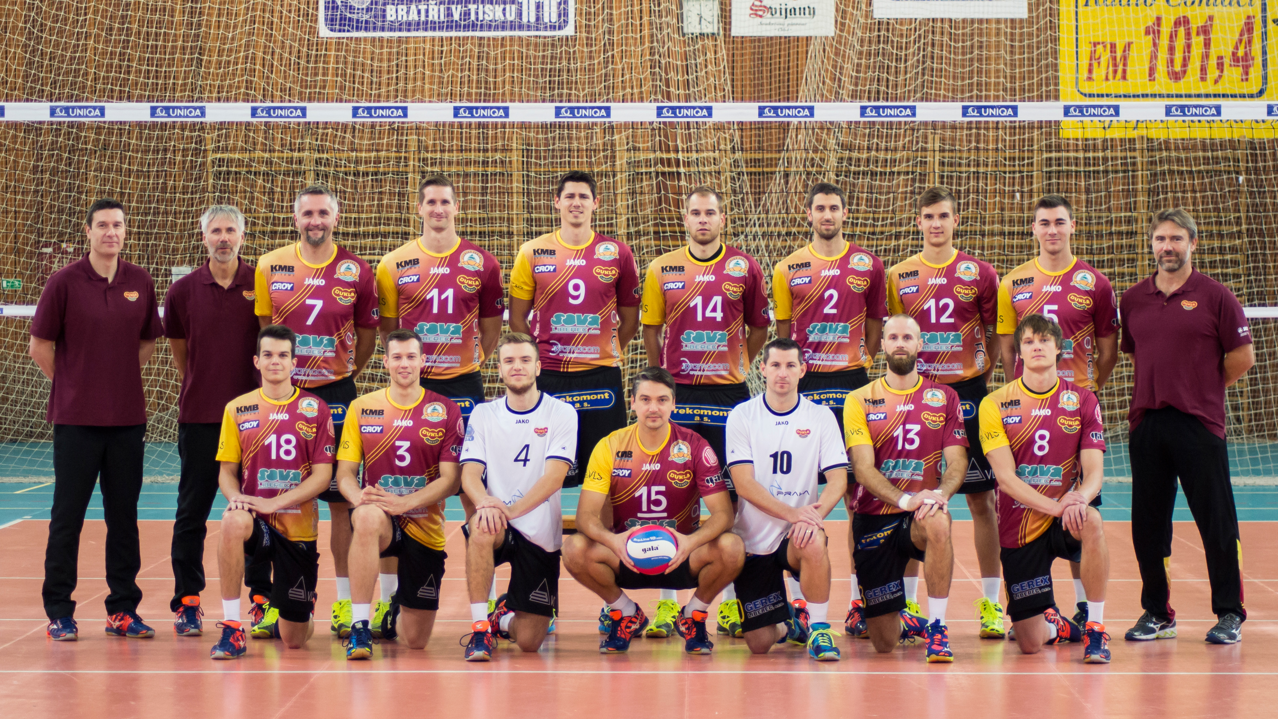 Tým hráčů ze sezóny 2017/2018